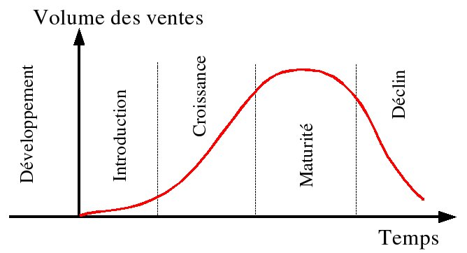 Cycle de vie produit. Les durées des différents stades du cycle peuvent être très différentes. Le stade de maturité peut également comporter un palier plus ou moins marqué. À chaque phase du cycle de vie du produit correspond un marketing mix adapté.